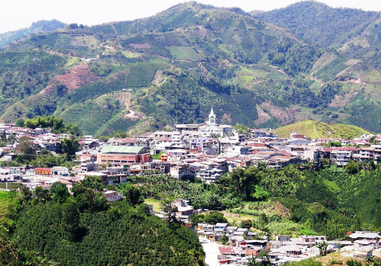 panoramica